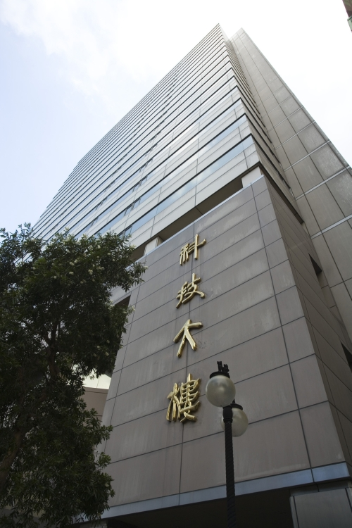 科技大樓，地址：臺北市大安區和平東路二段106號。